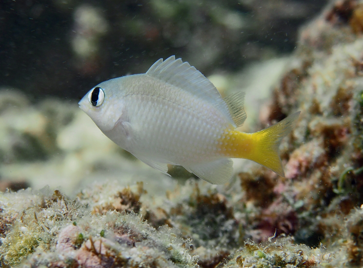 Une demoiselle Plectroglyphidodon imparipennis à la Réunion.